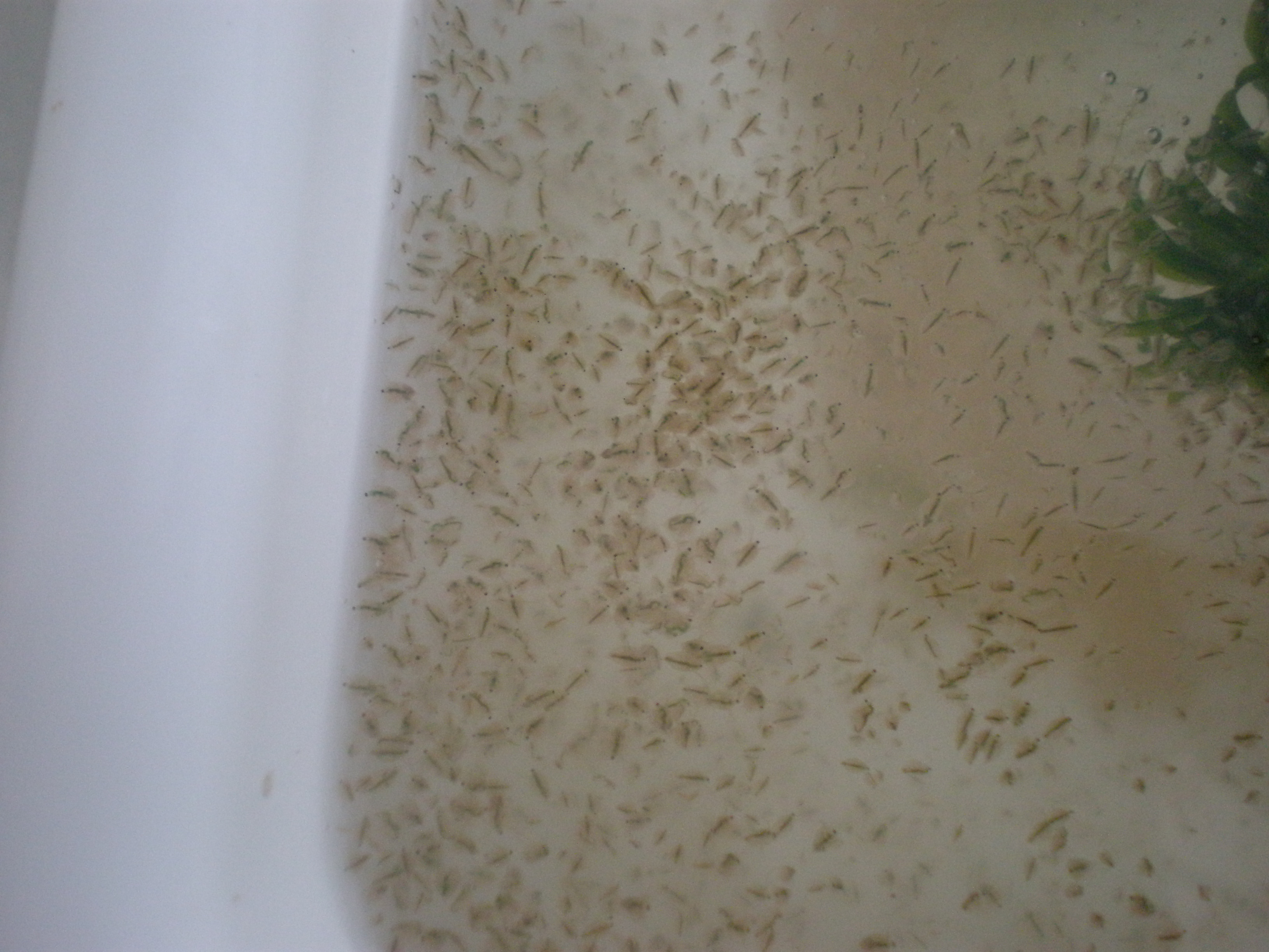 Purga d'augua, Daphnia magna. Pulga de agua, Daphnia magna.